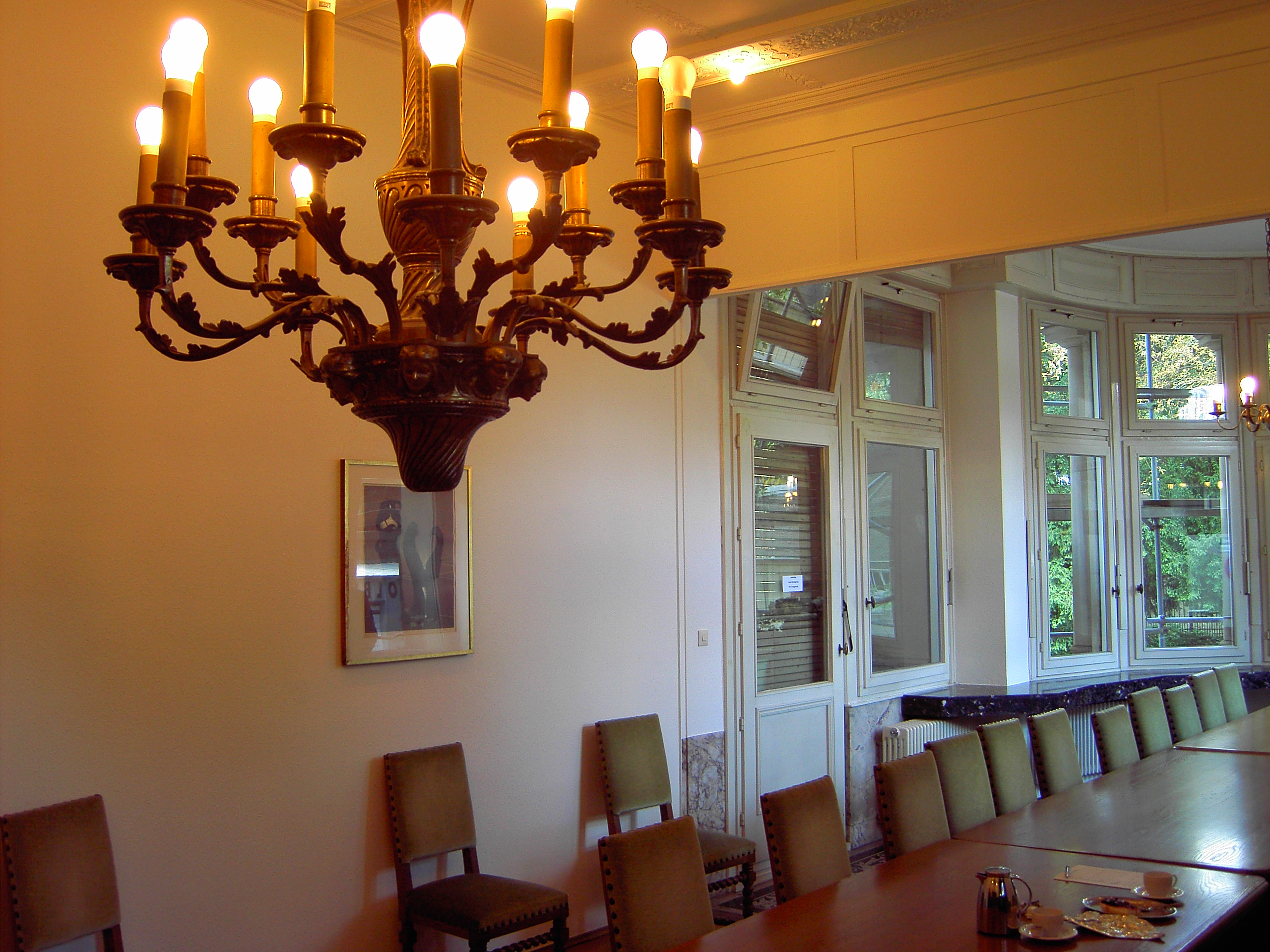 Empfangsraum der Villy Lynen, Stolberg